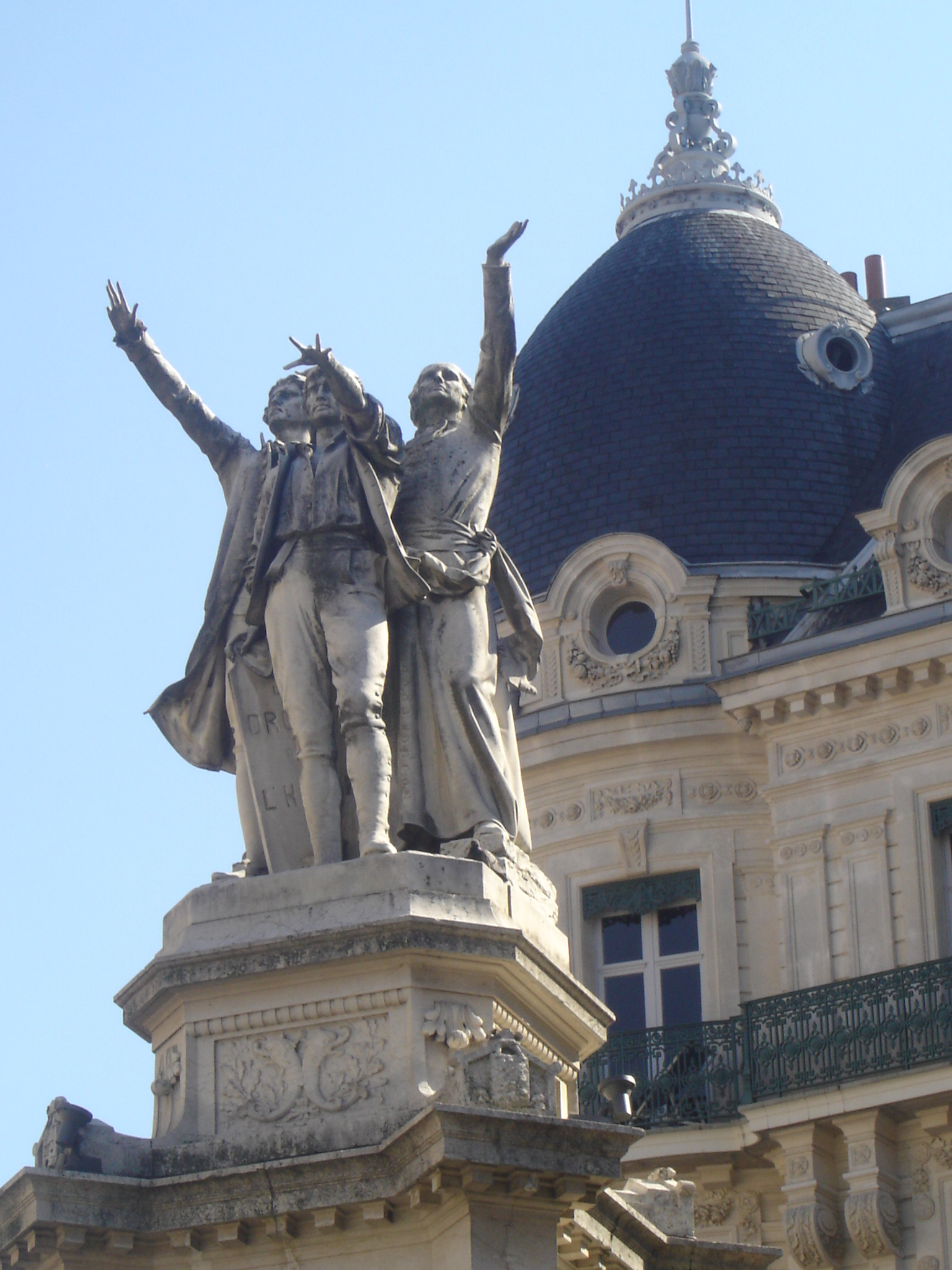 Place Notre-Dame à Grenoble : Fontaine des trois ordres ou Fontaine du centenaire élevée à l'occasion du centenaire de la pré-révolution dauphinoise de juin 1788.